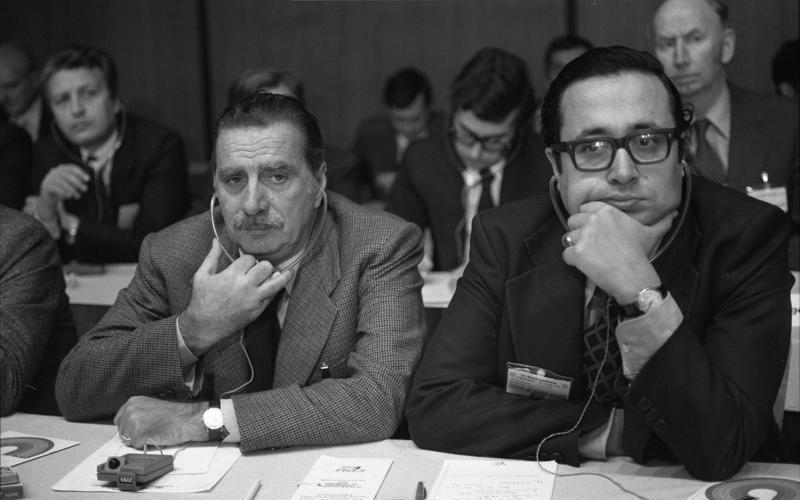 26. Bundesparteitag der CDU in der Friedrich-Ebert-Halle in Ludwigshafen [Lorenzo Natali, Amaro da Costa (Portugal)] 23.-25.10.1978